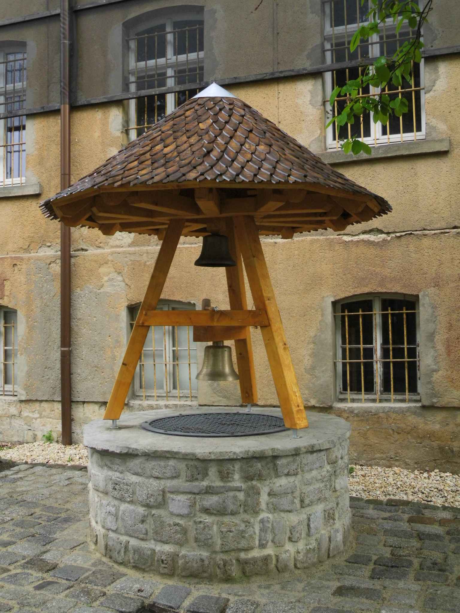 Glockenbrunnen